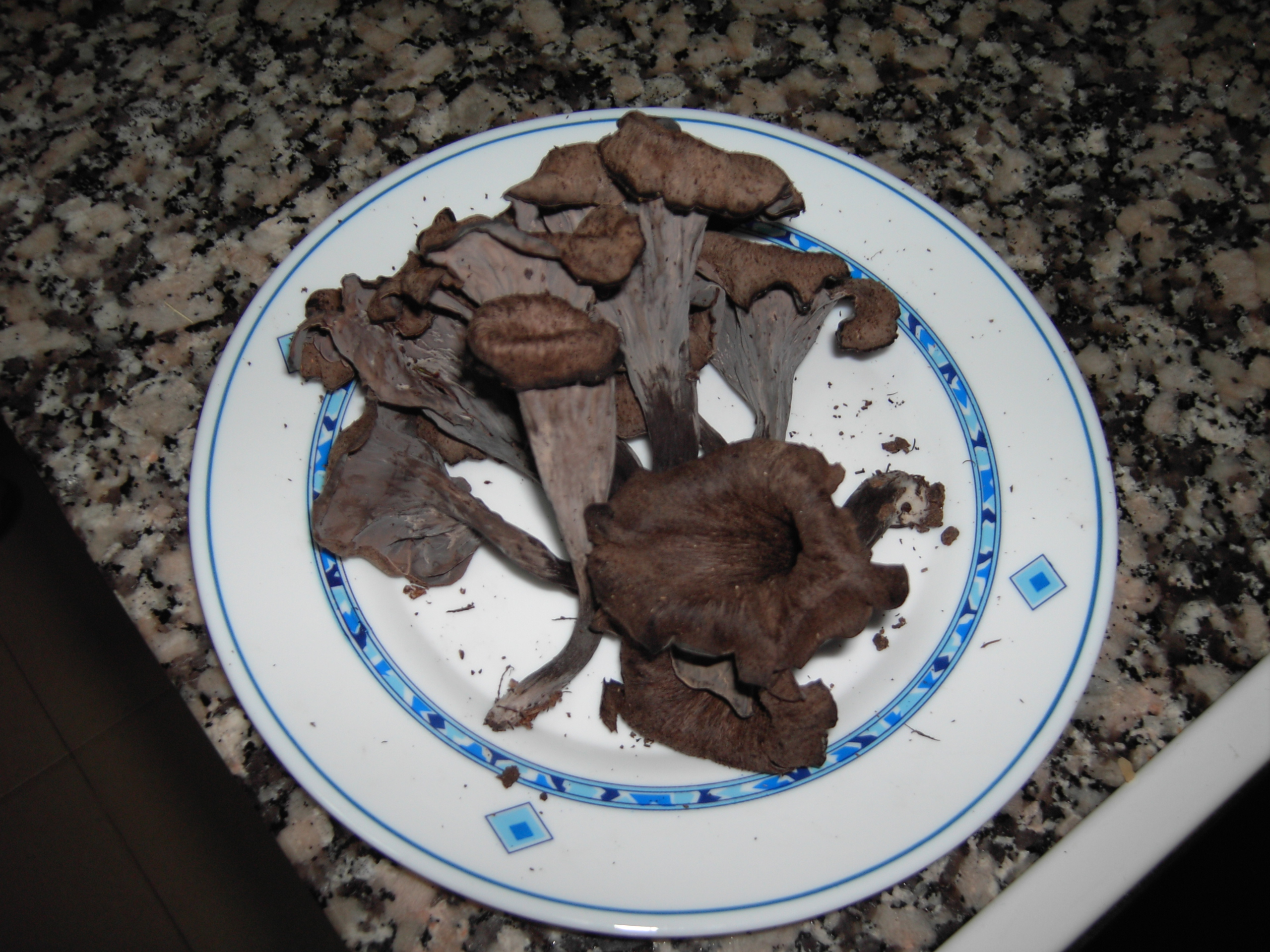 Craterellus cornucopioides